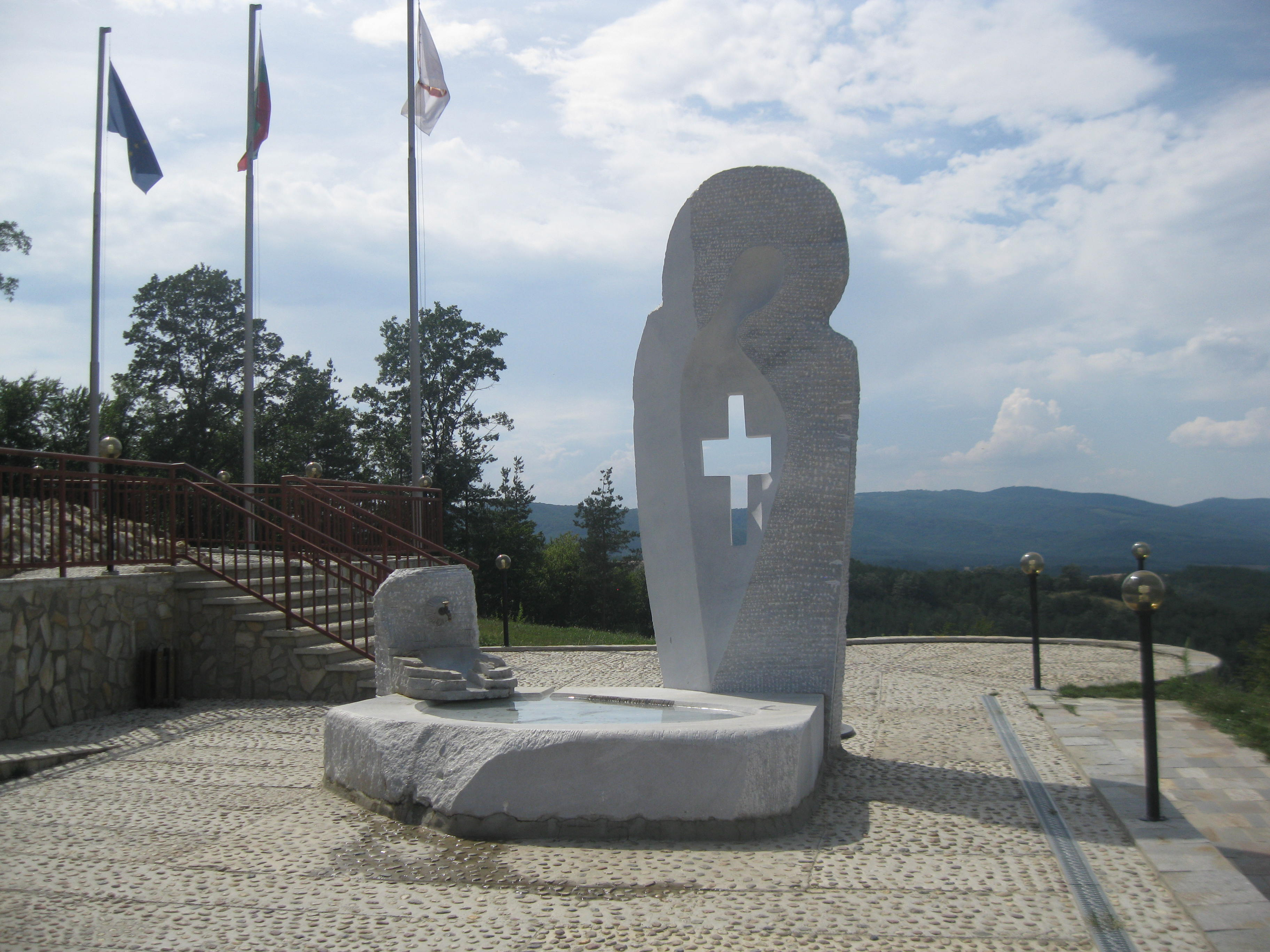 Късноантична крепост Цари Мали Град